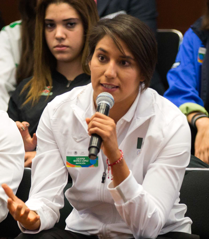 El Presidente Enrique Peña Nieto se reunió hoy con los deportistas que integraron la delegación mexicana que participó en los Juegos Olímpicos de Río de Janeiro 2016, a quienes les expresó su reconocimiento por el esfuerzo, la entrega, el empeño y el coraje que demostraron en esta justa olímpica y durante el proceso para llegar a ella.